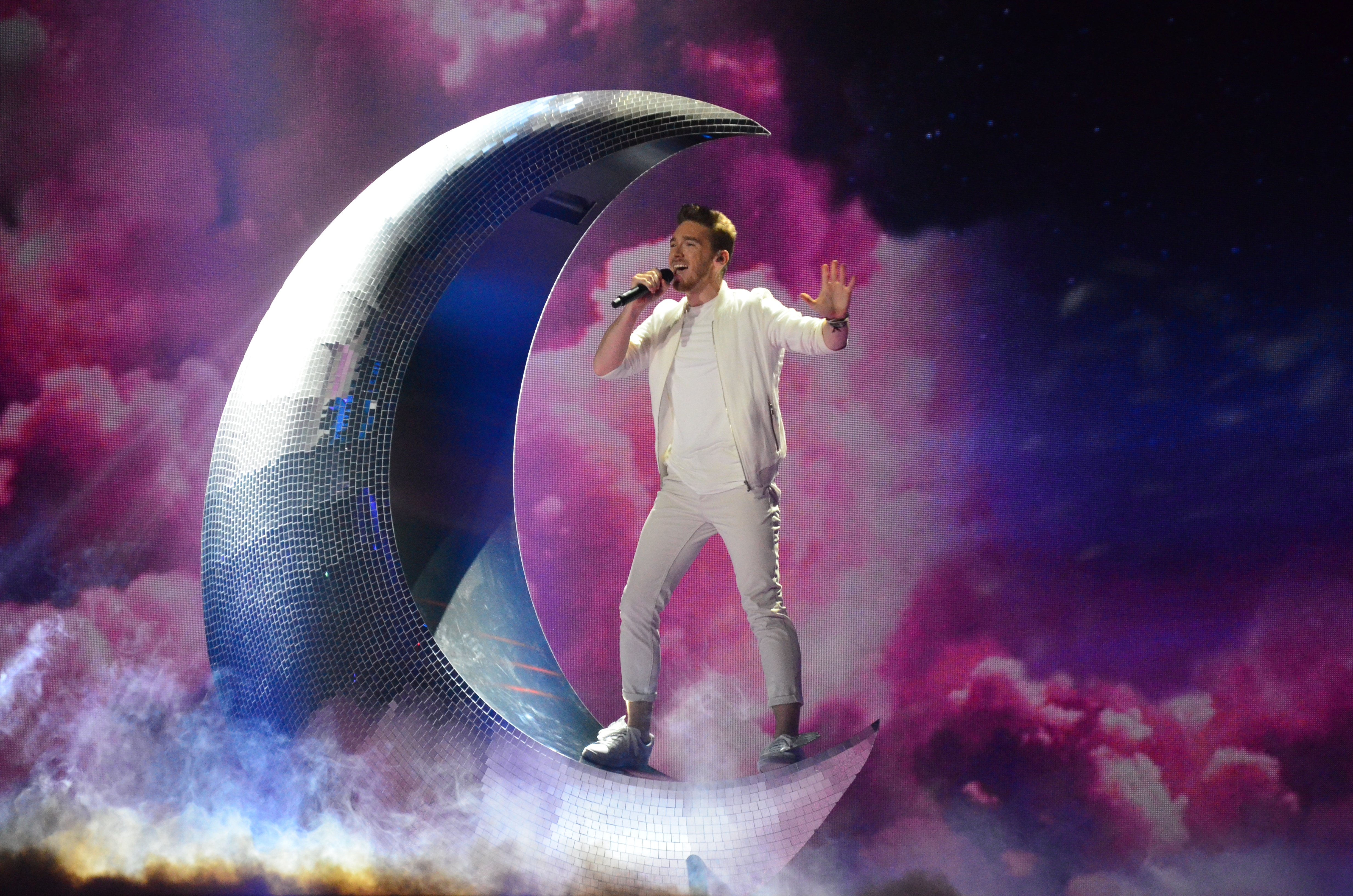 10 травня 2017 року у Києві відбулась генеральна репетиція 2 півфіналу "Євробачення".